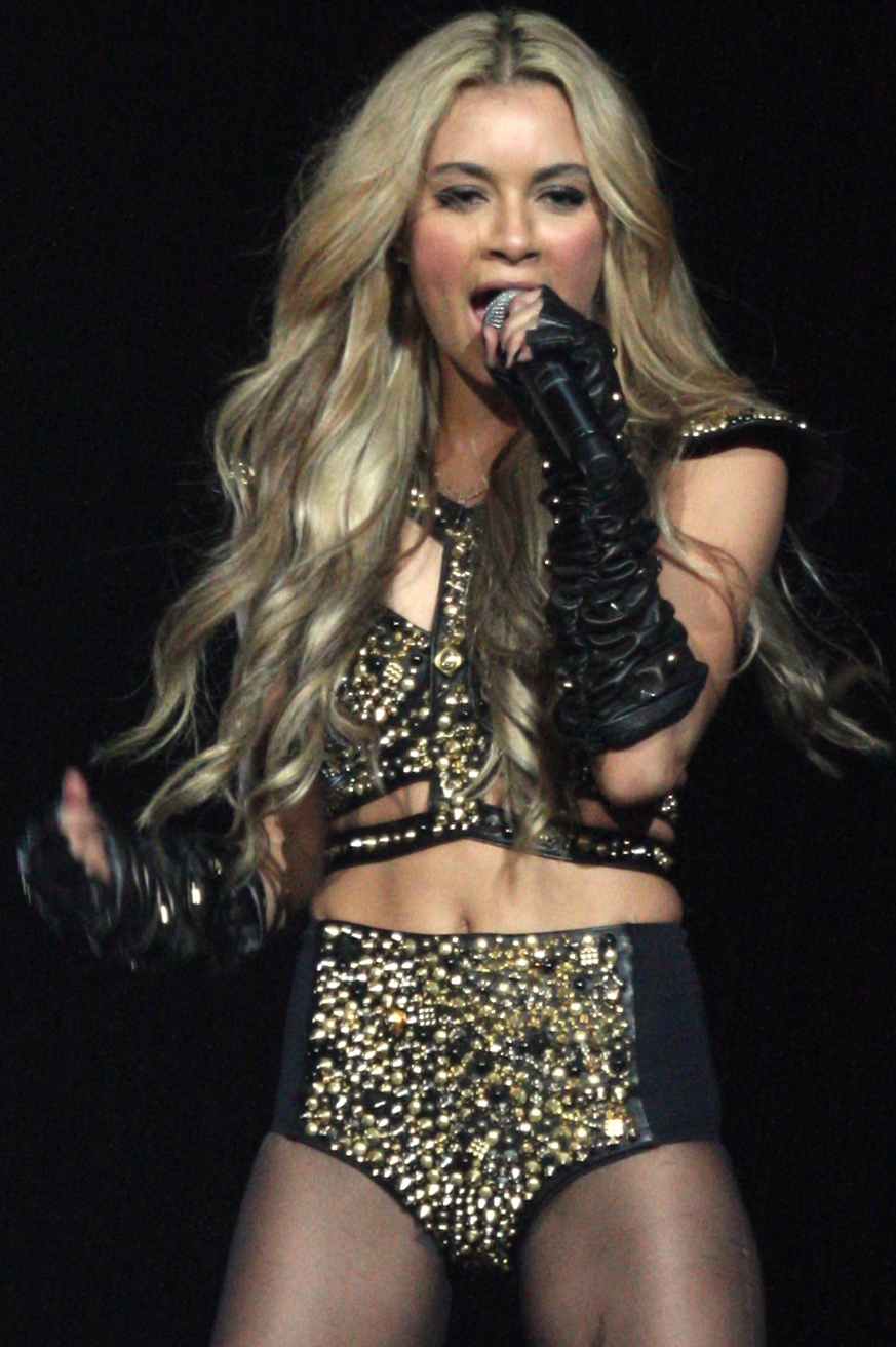 Dj Havana Brown